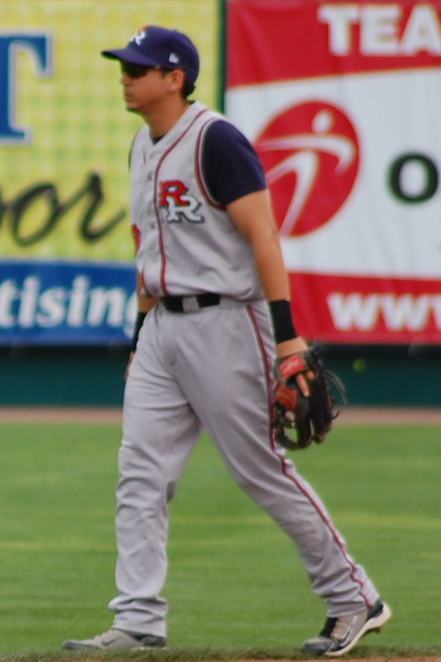 Oswaldo Navarro